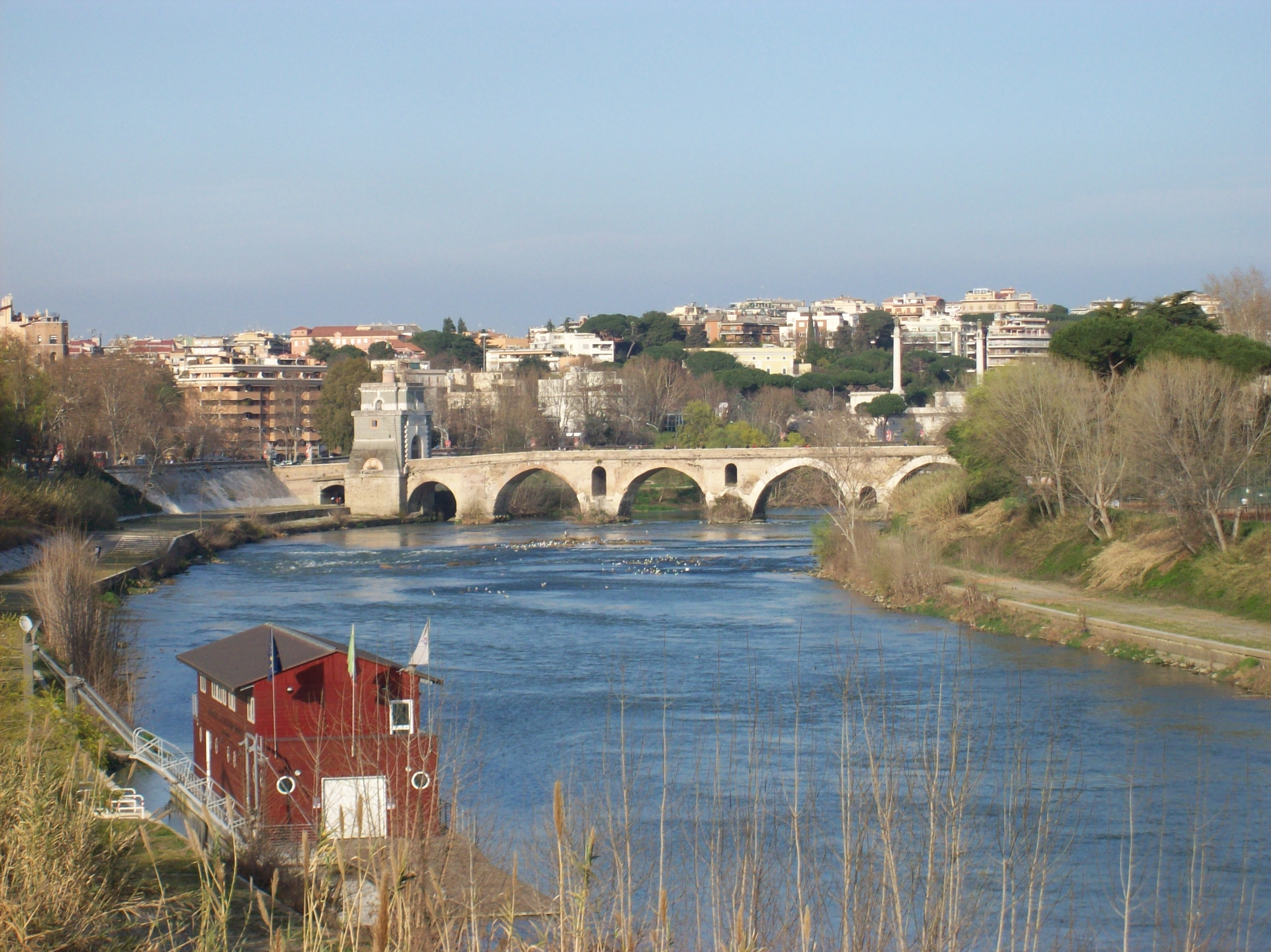 Ponte Milvio a Roma, visto da Ponte Duca d'Aosta